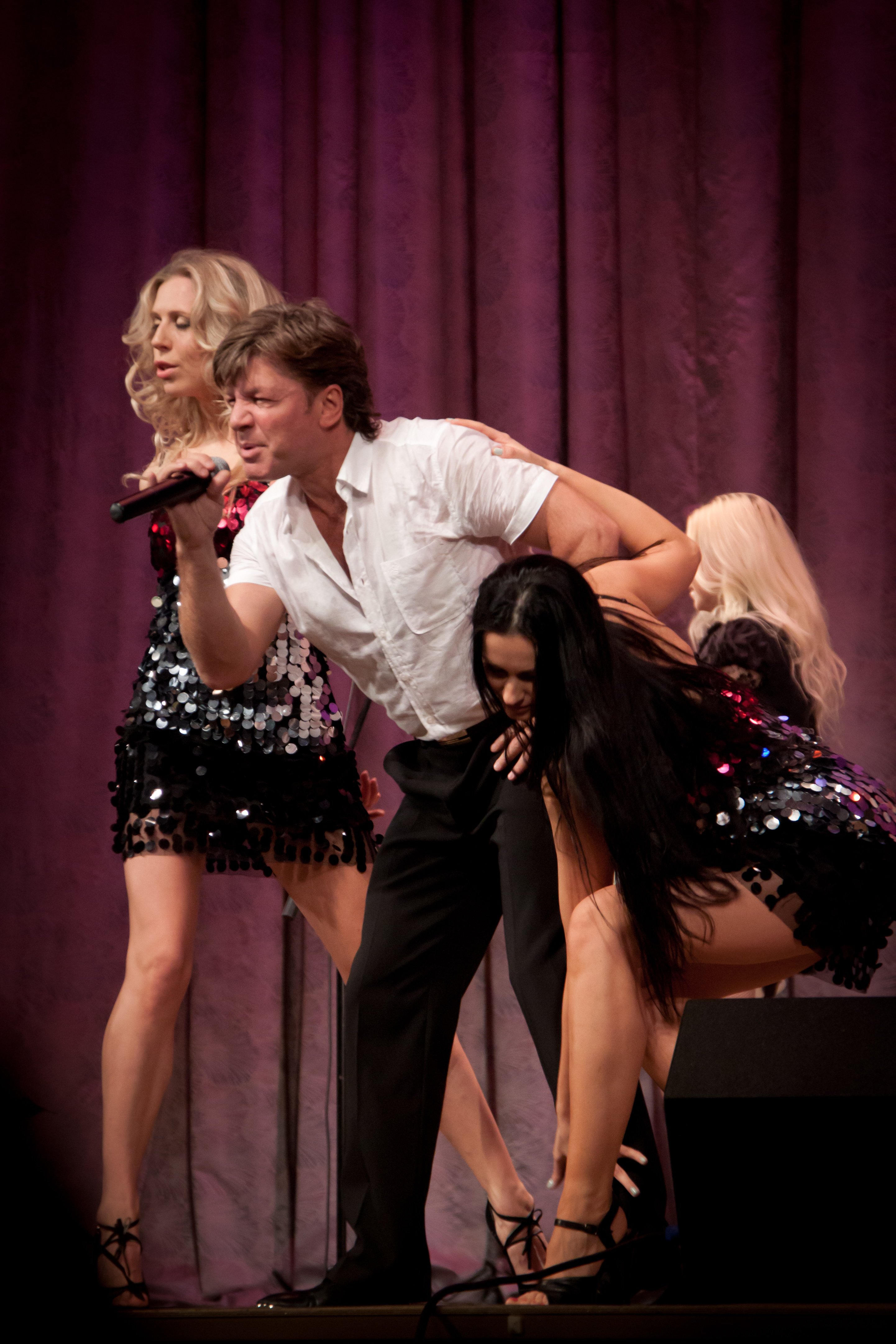 Певец Феликс Царикати